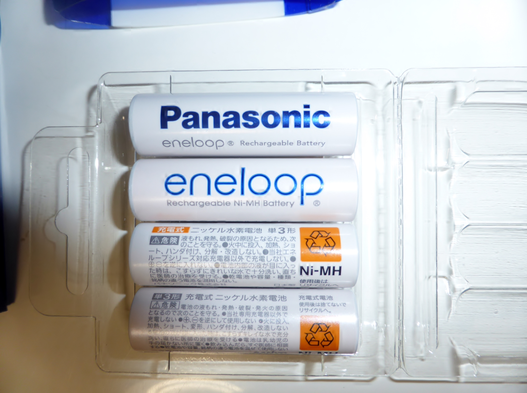 eneloopを三洋製とパナソニック製でそれぞれラベル（上半分）と説明書き（下半分）の比較（いずれも上がパナソニック製、下が三洋製）